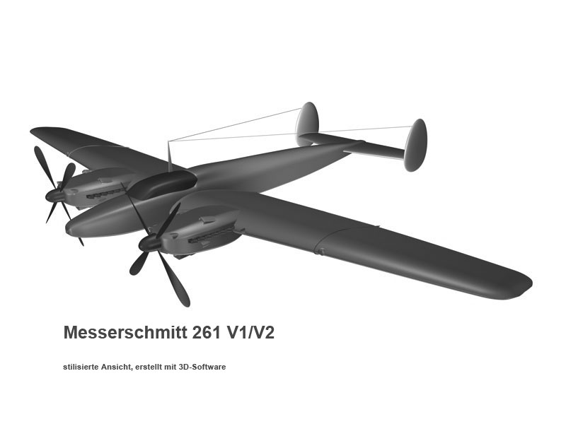 Bildbeschreibung: Messerschmitt 261 V1/V2 Quelle: Fotograf/Zeichner: Clemens Rainer Pohl Datum: 26.03.2006 Sonstiges: Absolut von mir zur Nutzung freigegeben, ohne Lizenzbedingungen